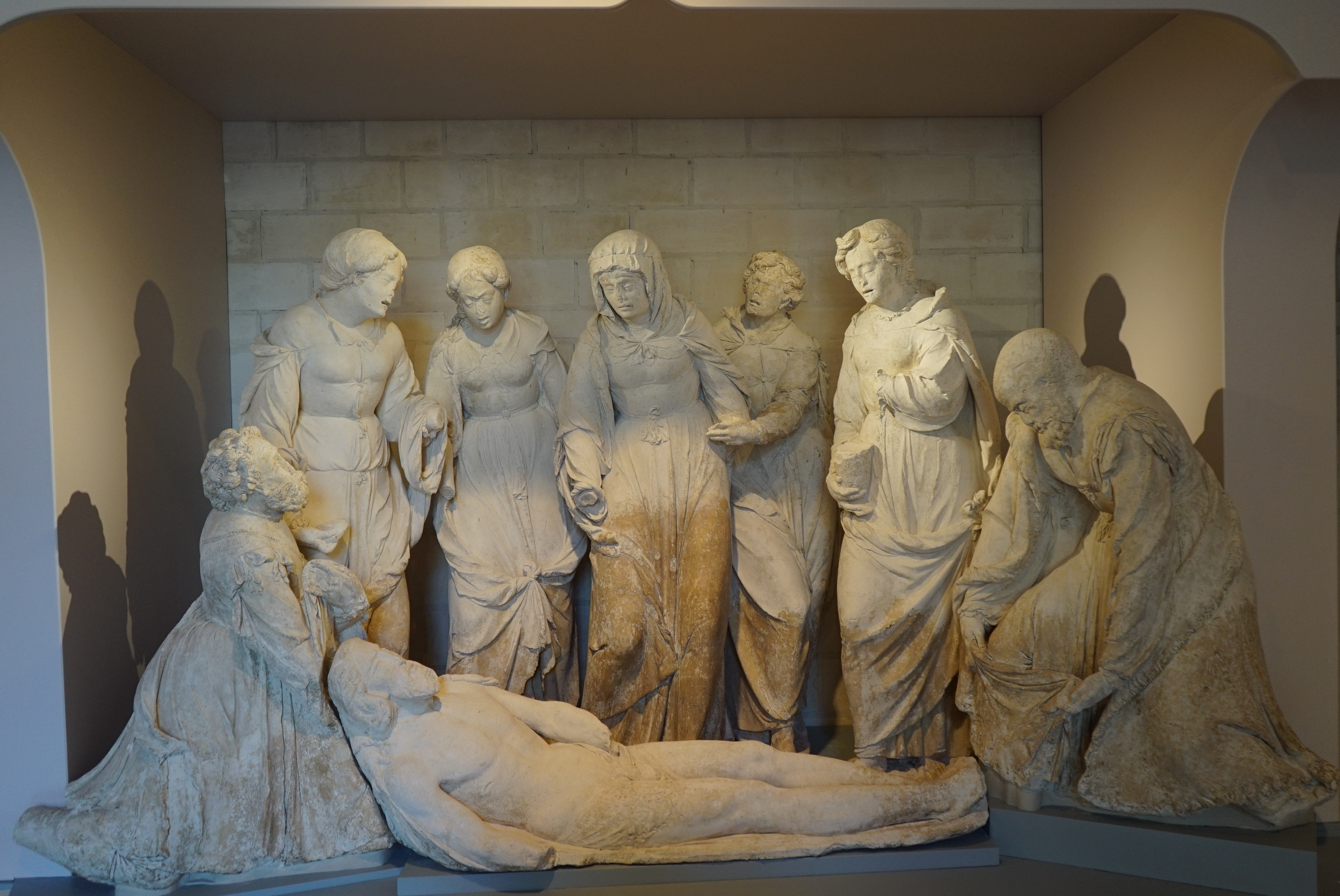 mise au tombeau provenant de l' abbaye de Montier-la-Celle.